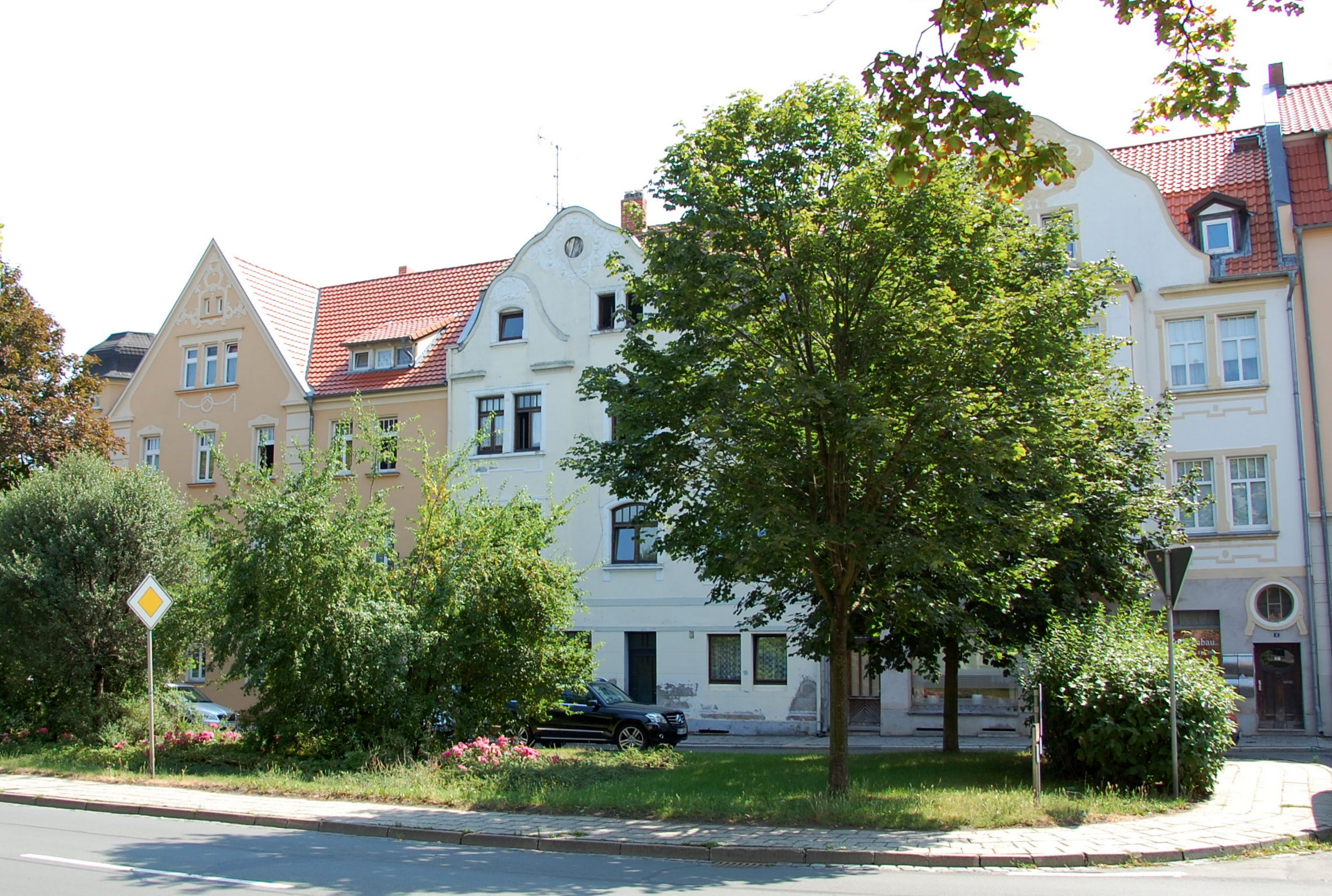 Häuser Stauffenbergplatz 1-3 in Quedlinburg